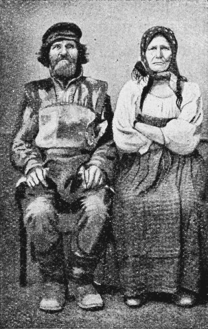 Карелы. 1928 г.